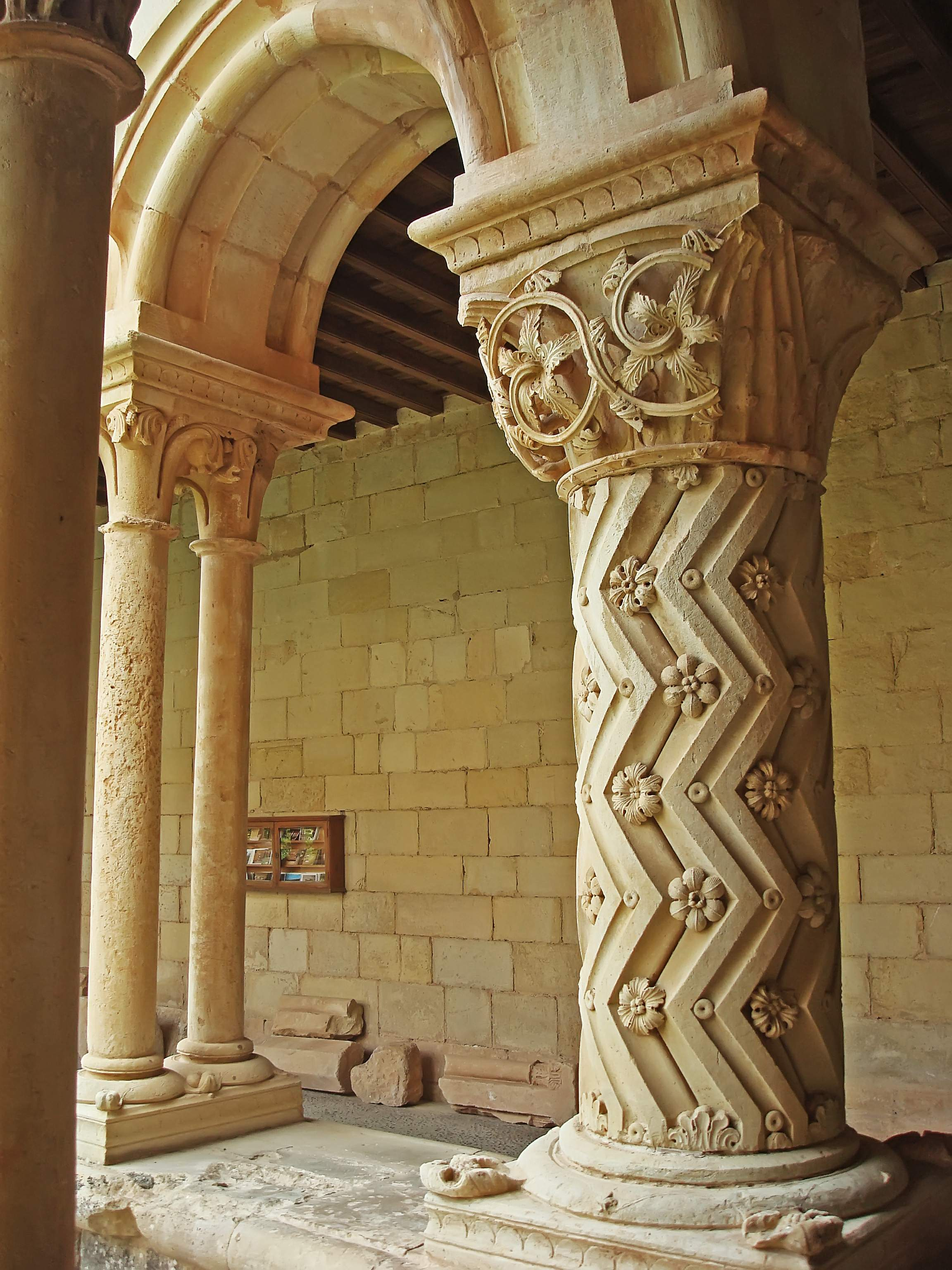 Claustro del Monasterio de San Andrés de Arroyo (Palencia)